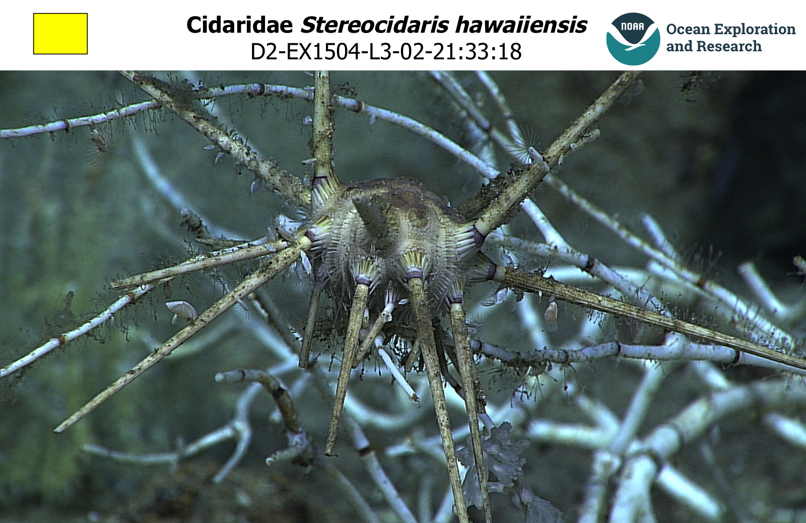 Un oursin Stereocidaris hawaiiensis observée dans les abysses par la mission Okeanos Explorer.